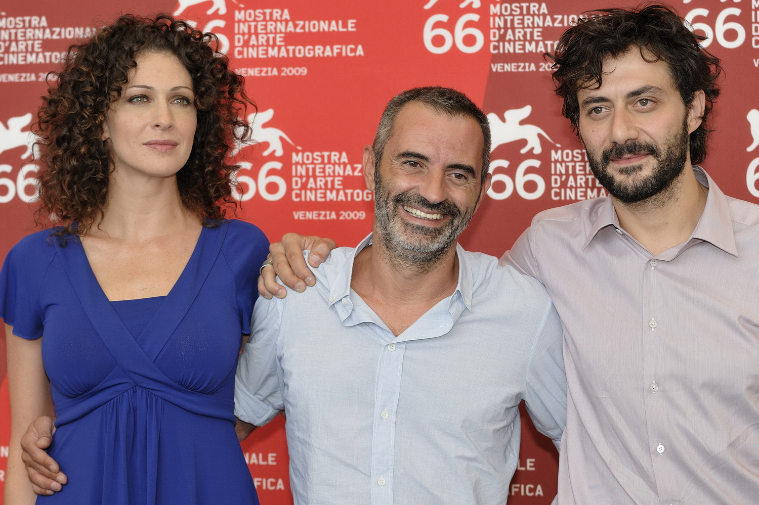 66ème Festival du Cinéma de Venise (Mostra), 9ème jour (10/09/2009)